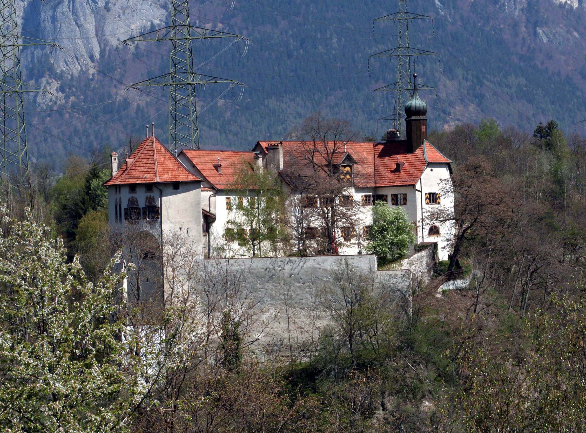 Schloss Rhäzüns, Süddseite